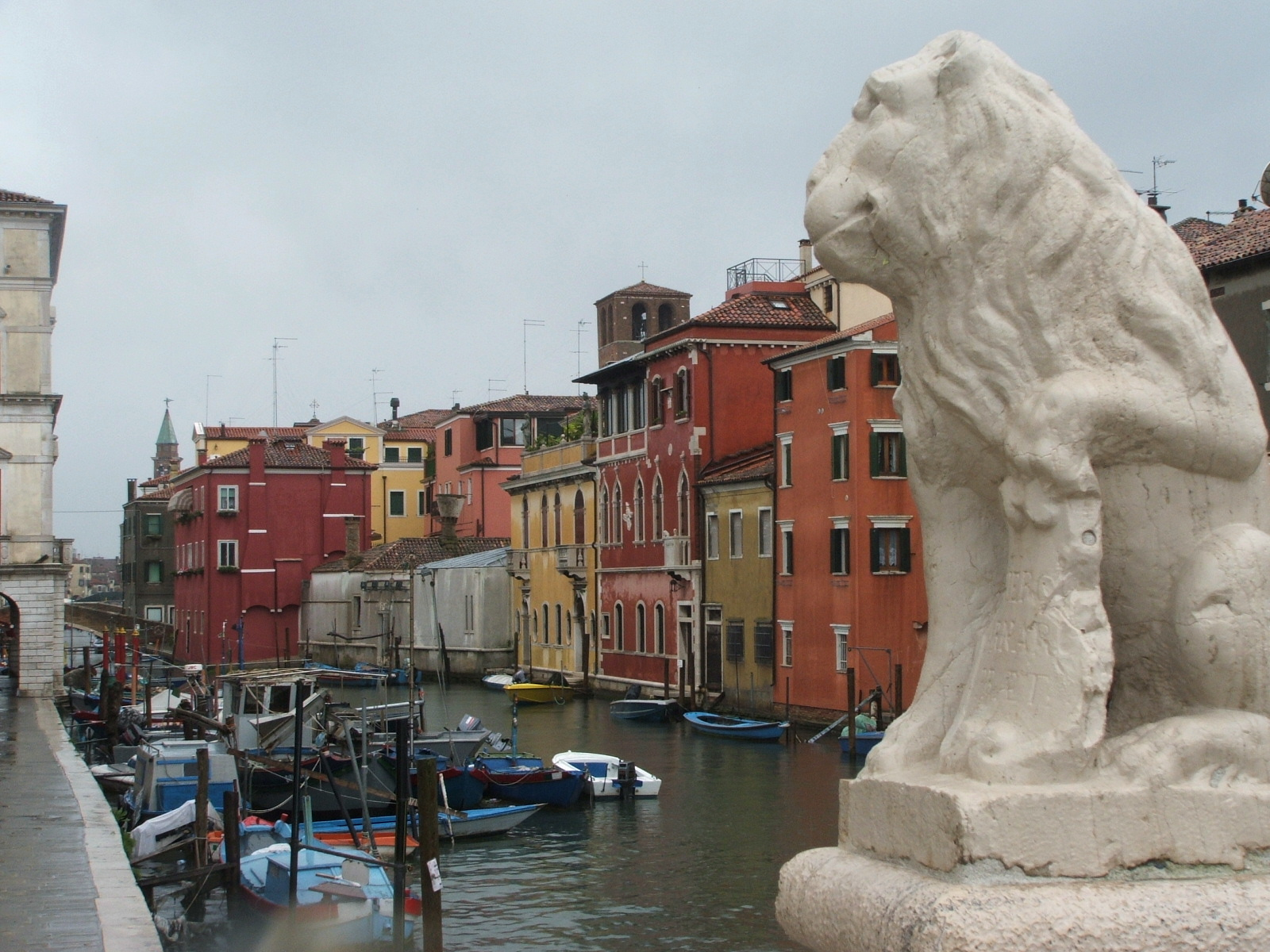 Chioggia, laguna veneta